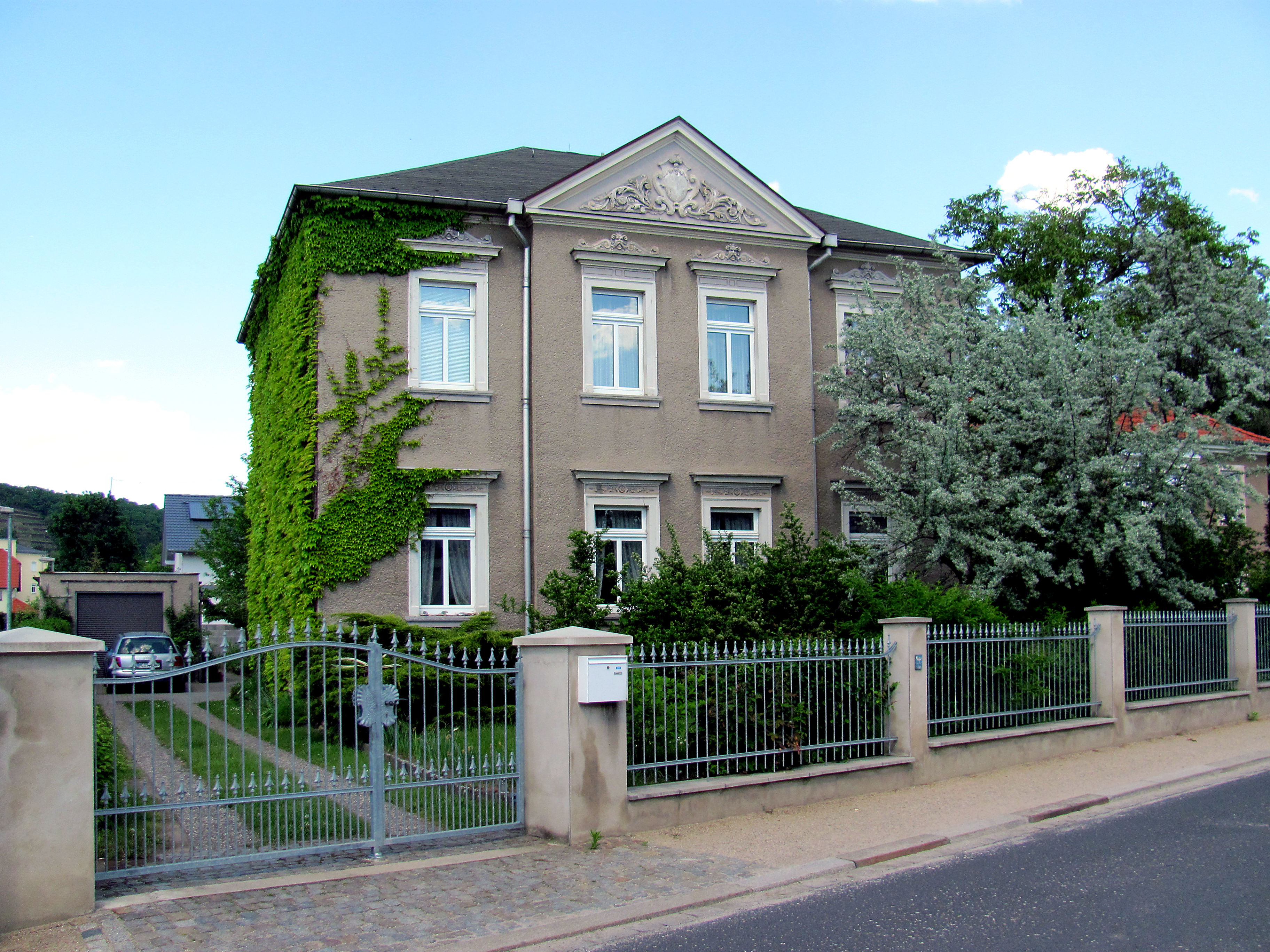 Radebeul-Niederlößnitz, Villa Borstraße 58